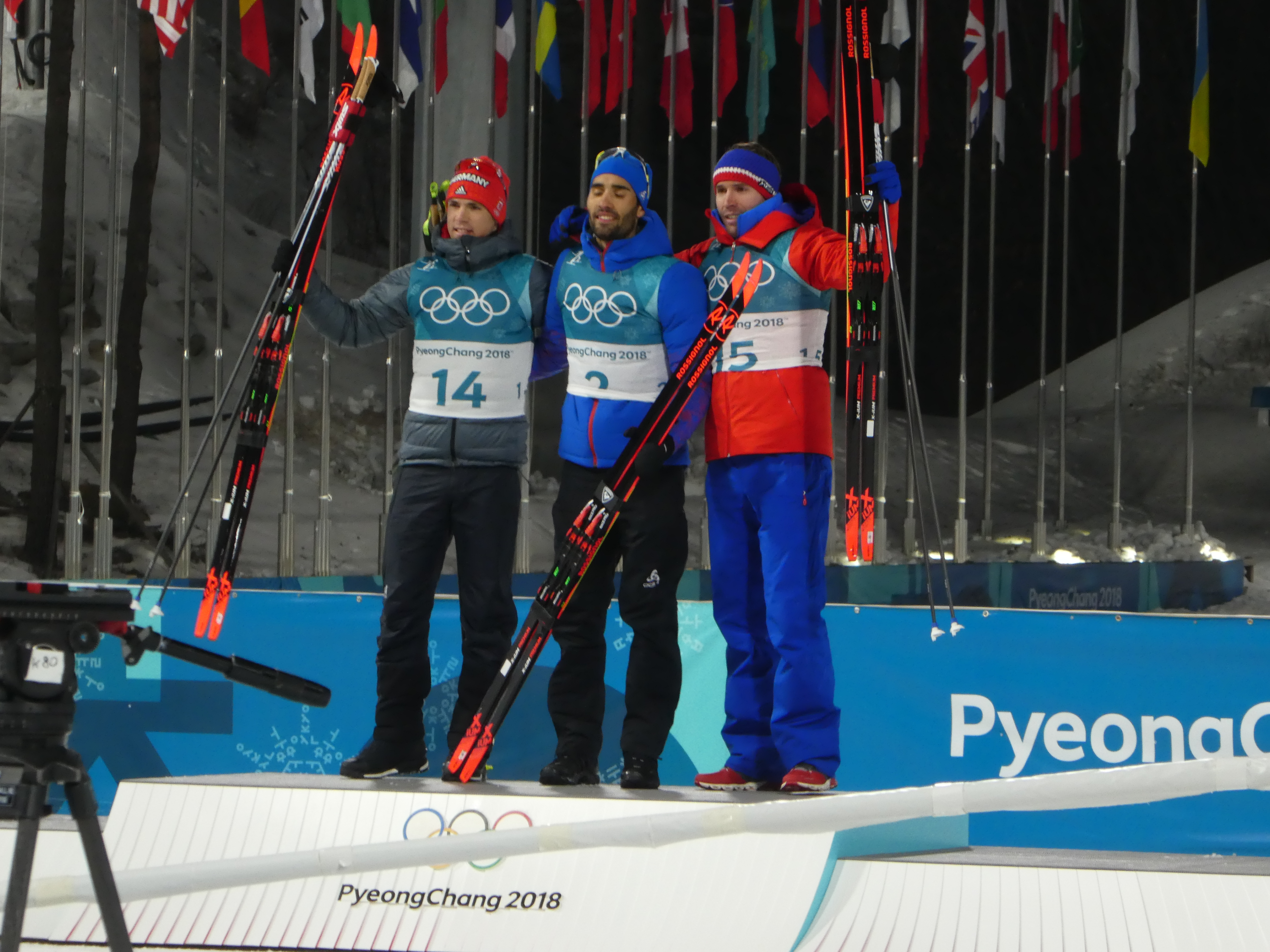 Alpensia, centre du biathlon 3 médaillés: Martin Fourcade, Simon Schempp et Emil Hegle Svendsen